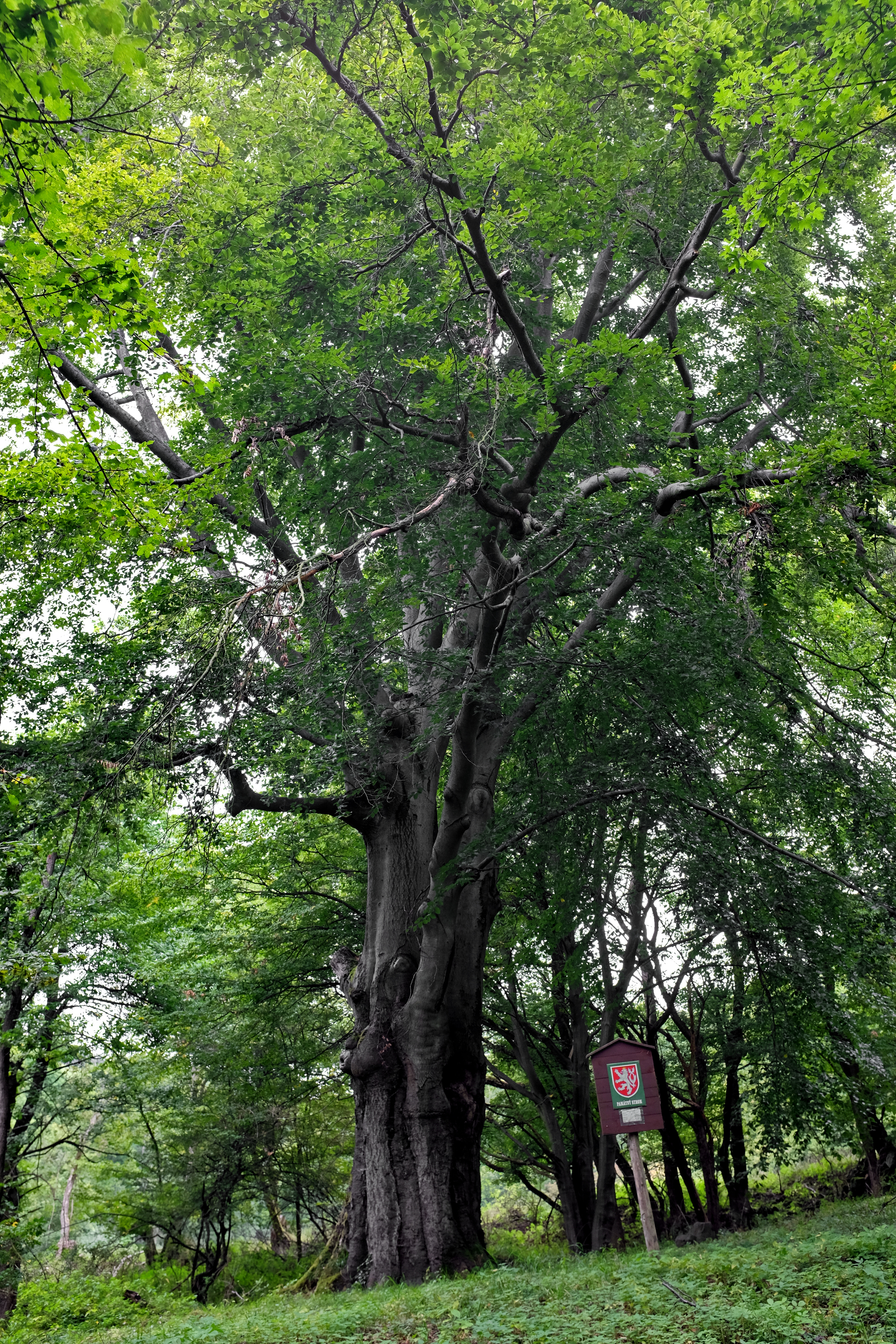 Památný strom - Pekelský buk - Stráž nad Ohří, okres Karlovy Vary